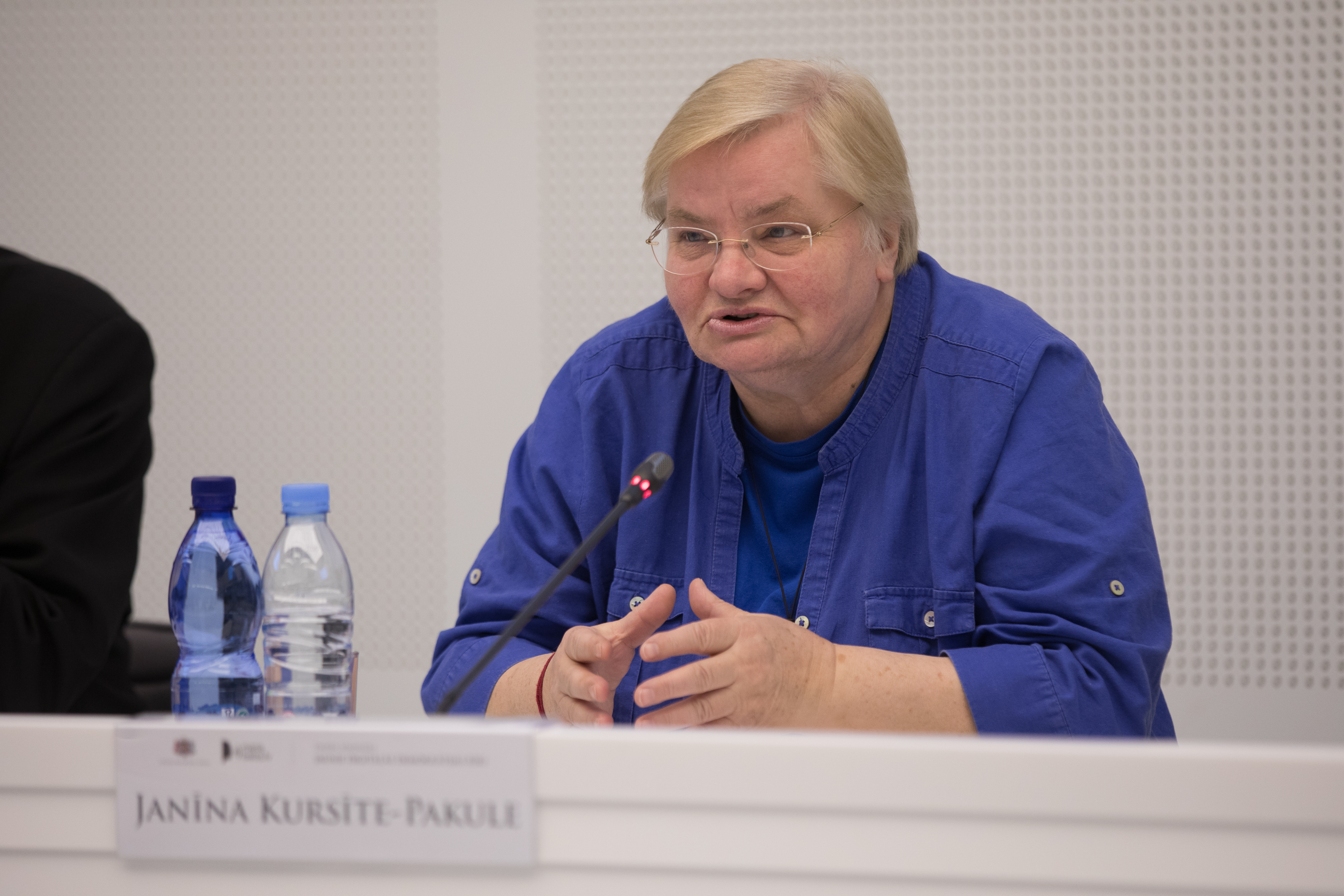 2019.gada 4.februāris. Saeimas Mandātu, ētikas un iesniegumu komisijas un nodibinājuma “Sabiedrības Līdzdalības Fonds” platformas ManaBalss.lv kopīgi rīkots darba seminārs “Jaunie digitālās demokrātijas rīki”. Foto: Ernests Dinka, Saeima Izmantošanas noteikumi: saeima.lv/lv/autortiesibas